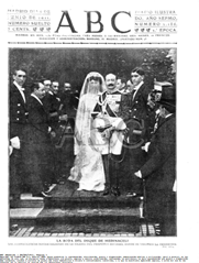 Portada del diario ABC (06 de junio de 1911)